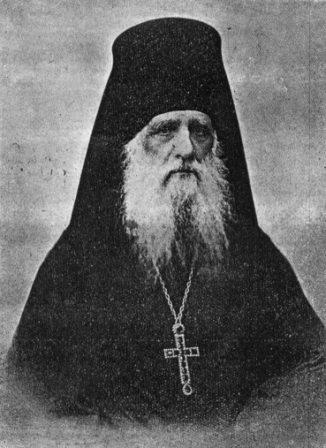 Архимандрит, настоятель Рязанского Троицкого монастыря.